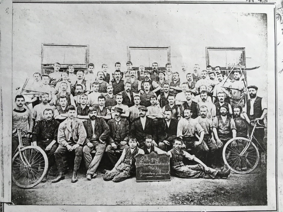 1898, zwei Jahre nach der Firmengründung war die Belegschaft von Grundner & Lemisch auf 63 Mitarbeiter angewachsen